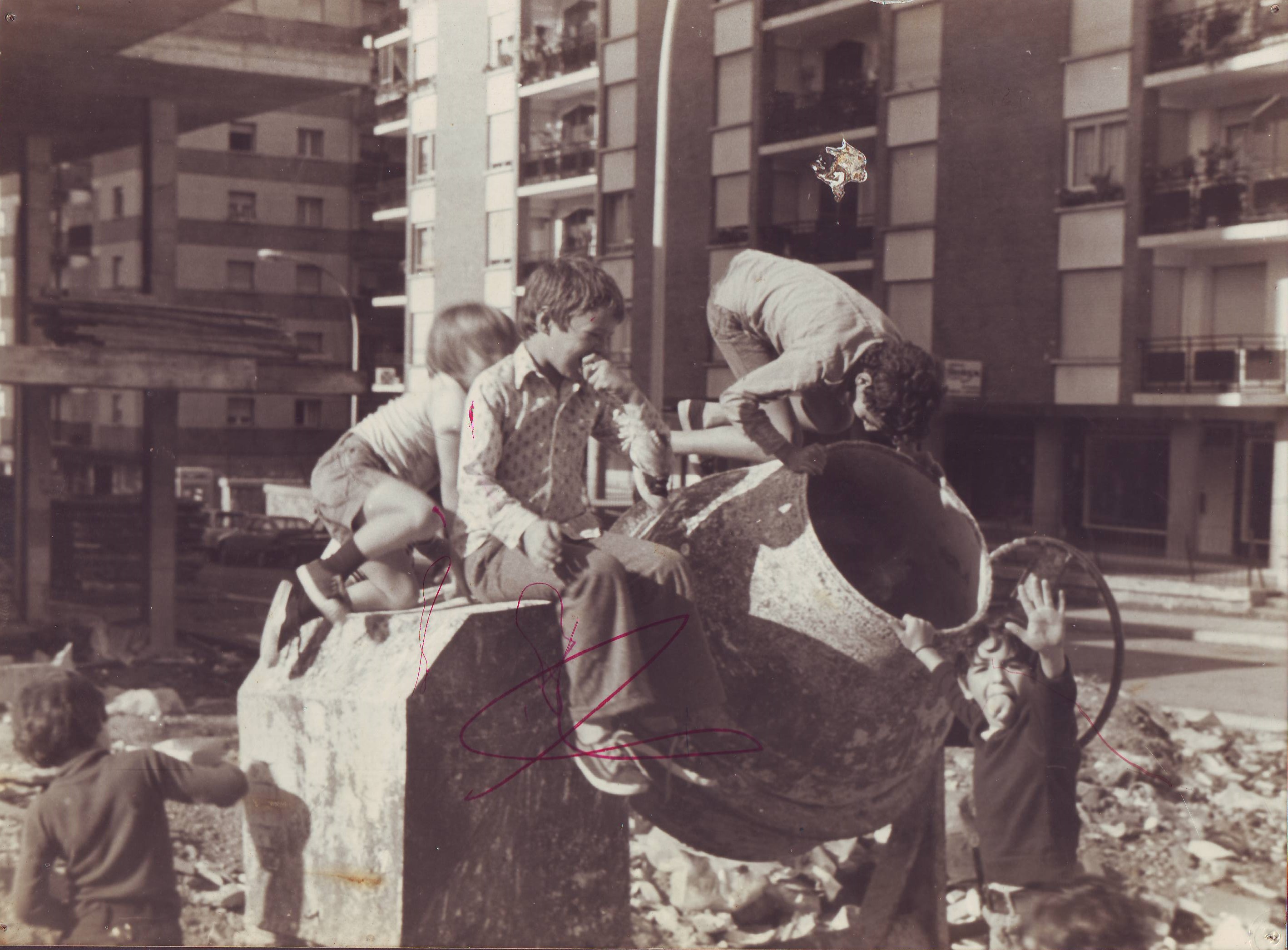 Haurrak kalean jolasean Larratxon 1970. hamarkadan.